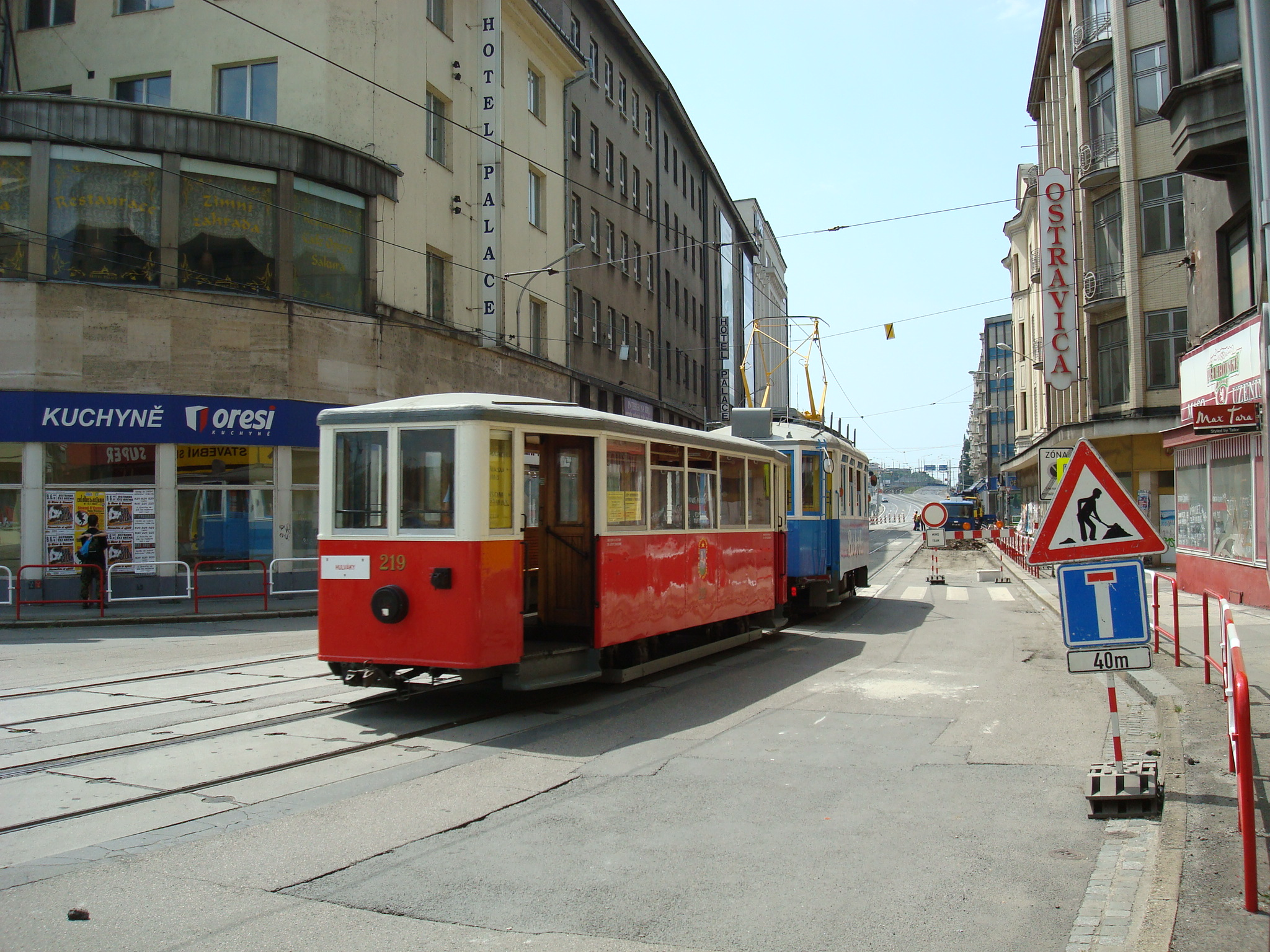 Historický vlečný vůz ev. č. 219 v Ostravě